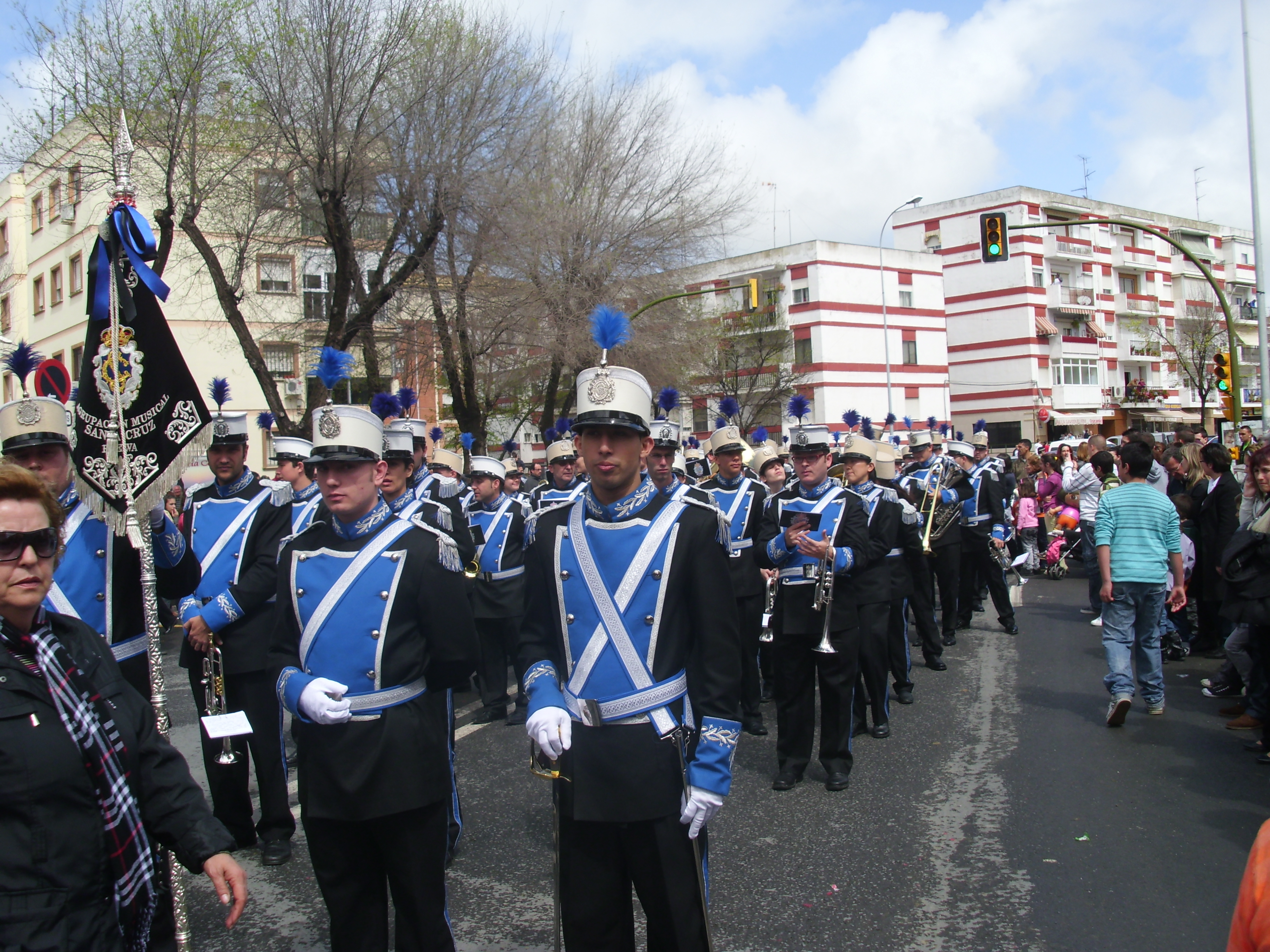 Agrupación Musical Lignum Crucis (Santa Cruz)